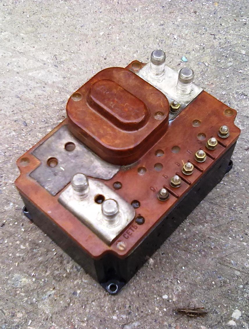 Дифференциально-минимальное реле ДМР-600 системы электроснабжения летательных аппаратов